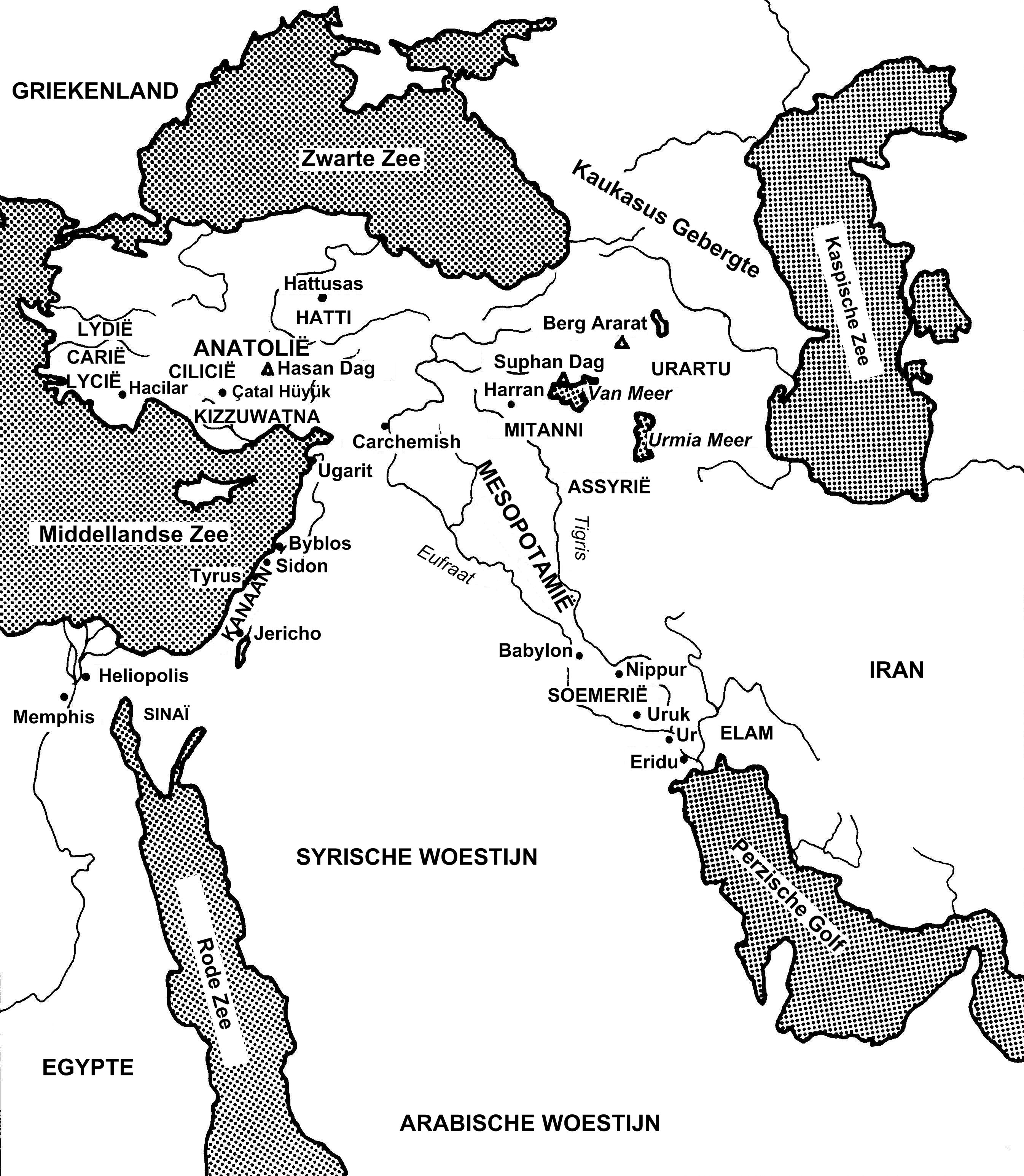 Map Midden-Oosten